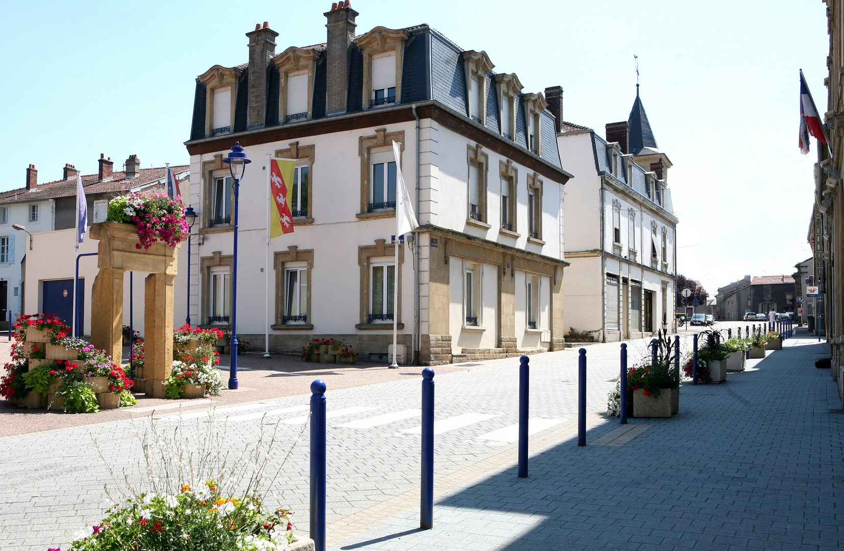 Face à la Mairie